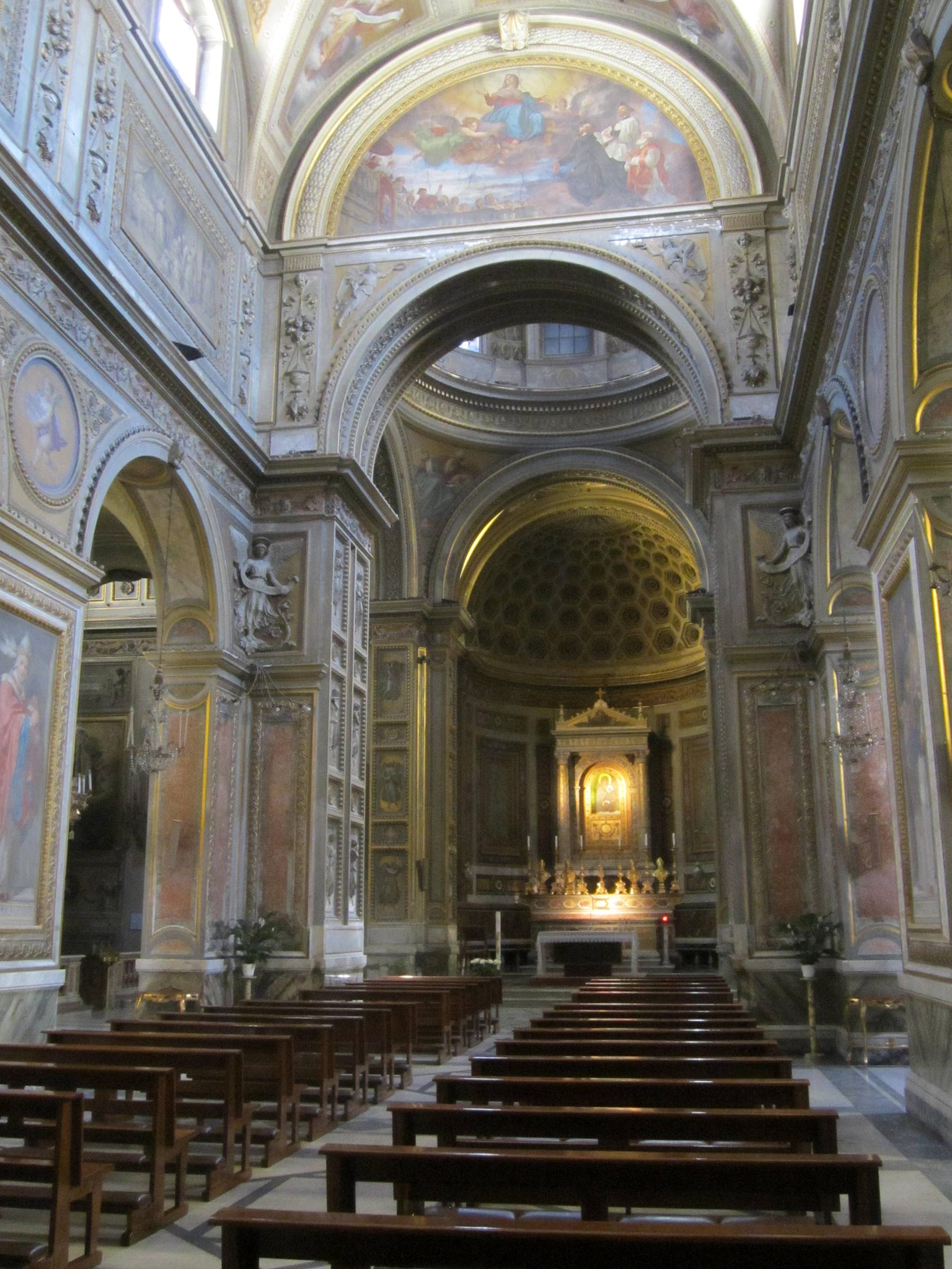 Interno della Chiesa di Santa Maria in Aquiro a Roma